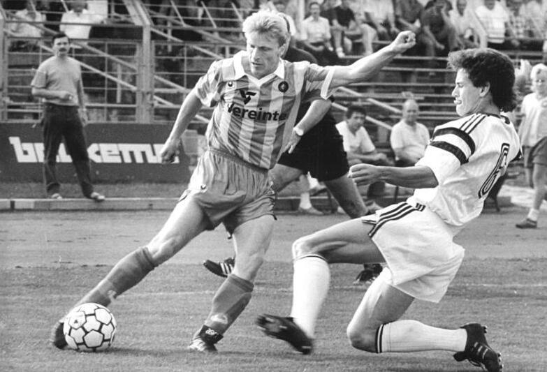 ADN-Friedrich Gahlbeck-31.8.90-Leipzig: Fußball-Oberliga- 1. FC Lok Leipzig - Eisenhüttenstädter FC Stahl 0:0 Zweikampf zwischen Stefan Hammermüller (l.) von Lok Leipzig und Frank Bartz vom FC Stahl.